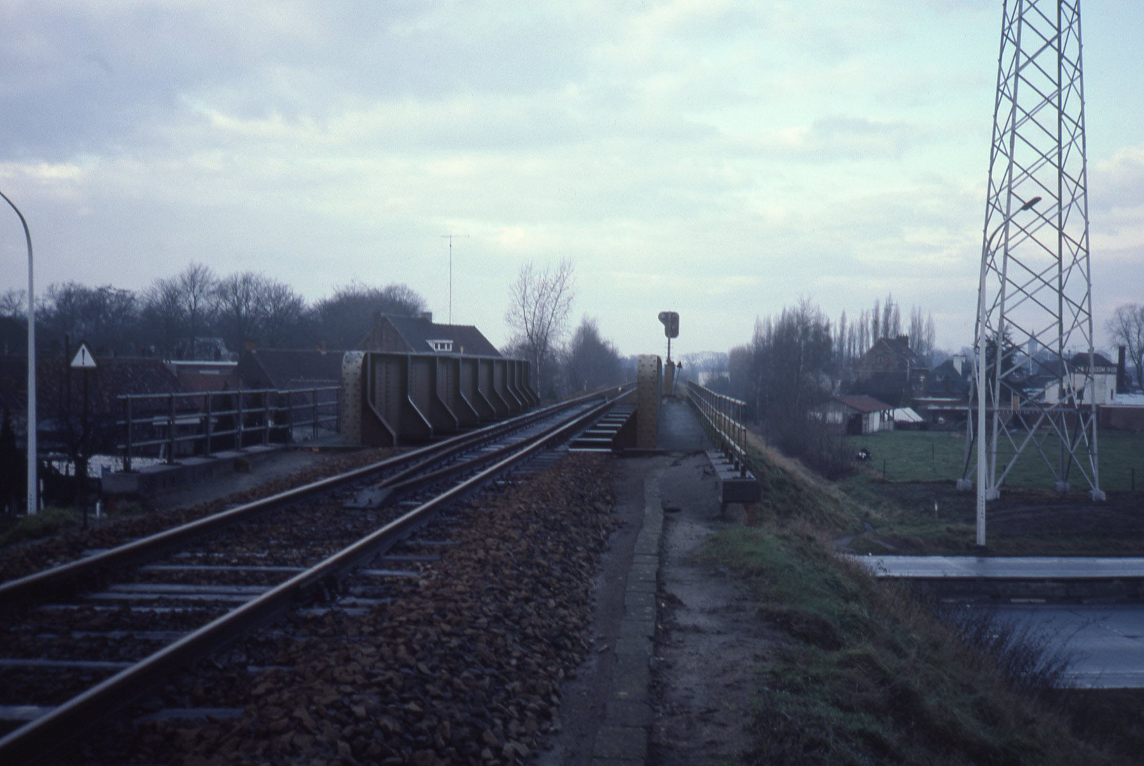 De spoorbrug over de Industrieweg in Wondelgem